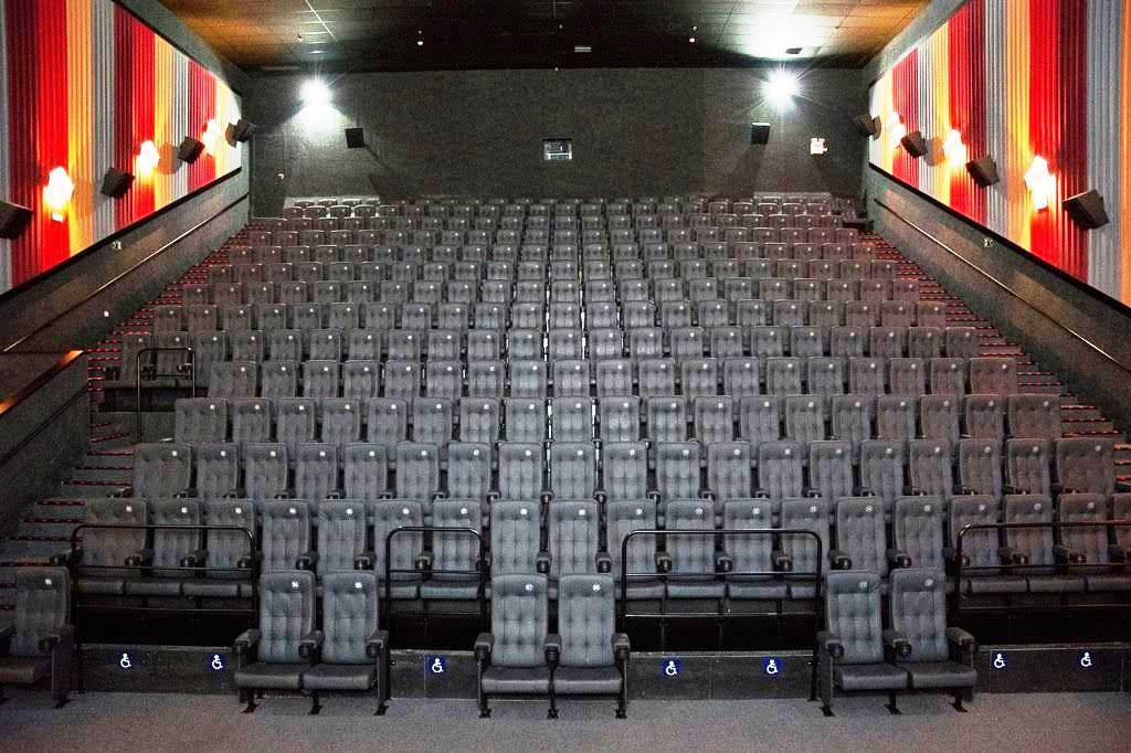 Sala com projeção 3D Cineflix Shopping Botucatu, de Botucatu